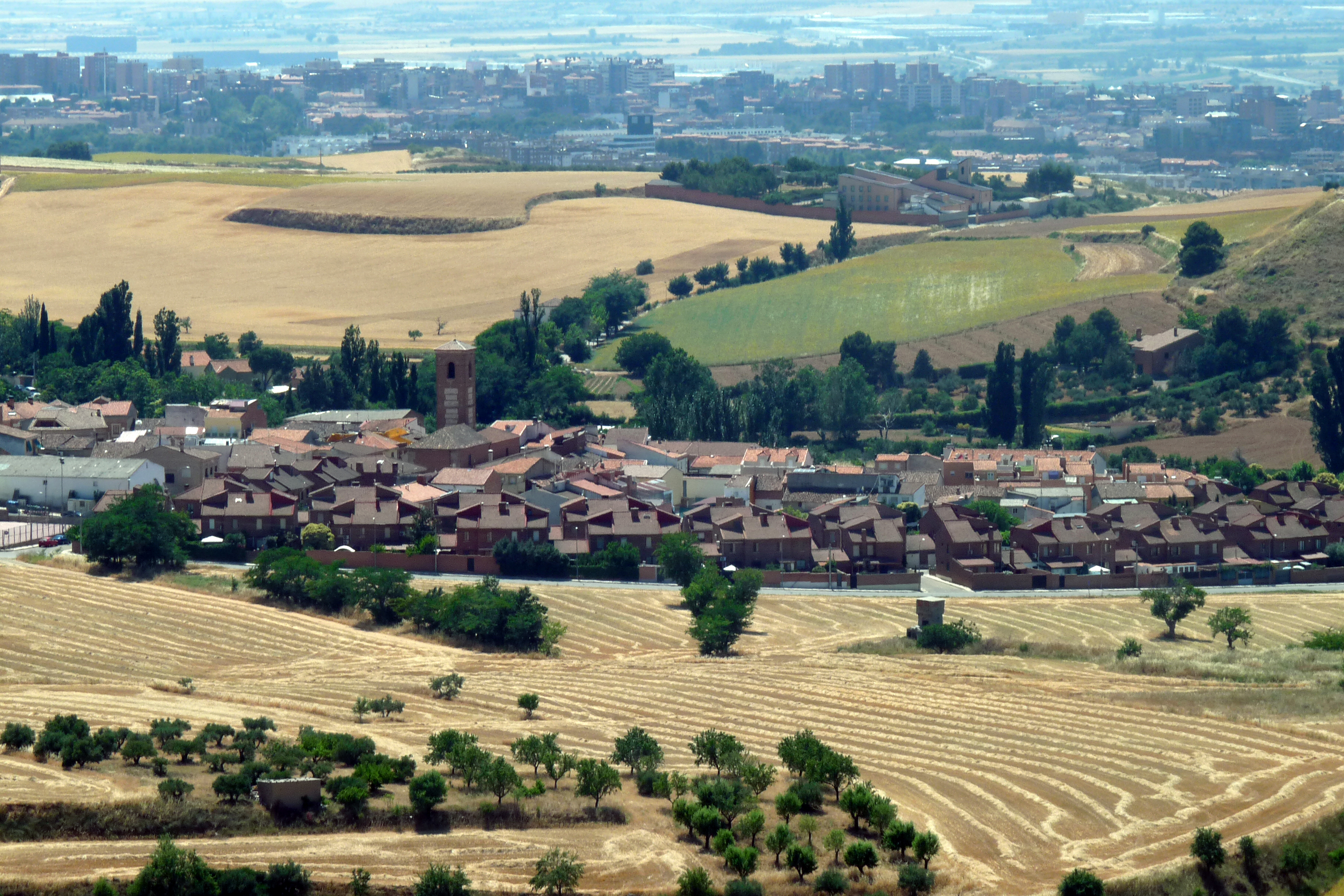 Vista de Iriépal desde el este. Guadalajara en segundo plano.